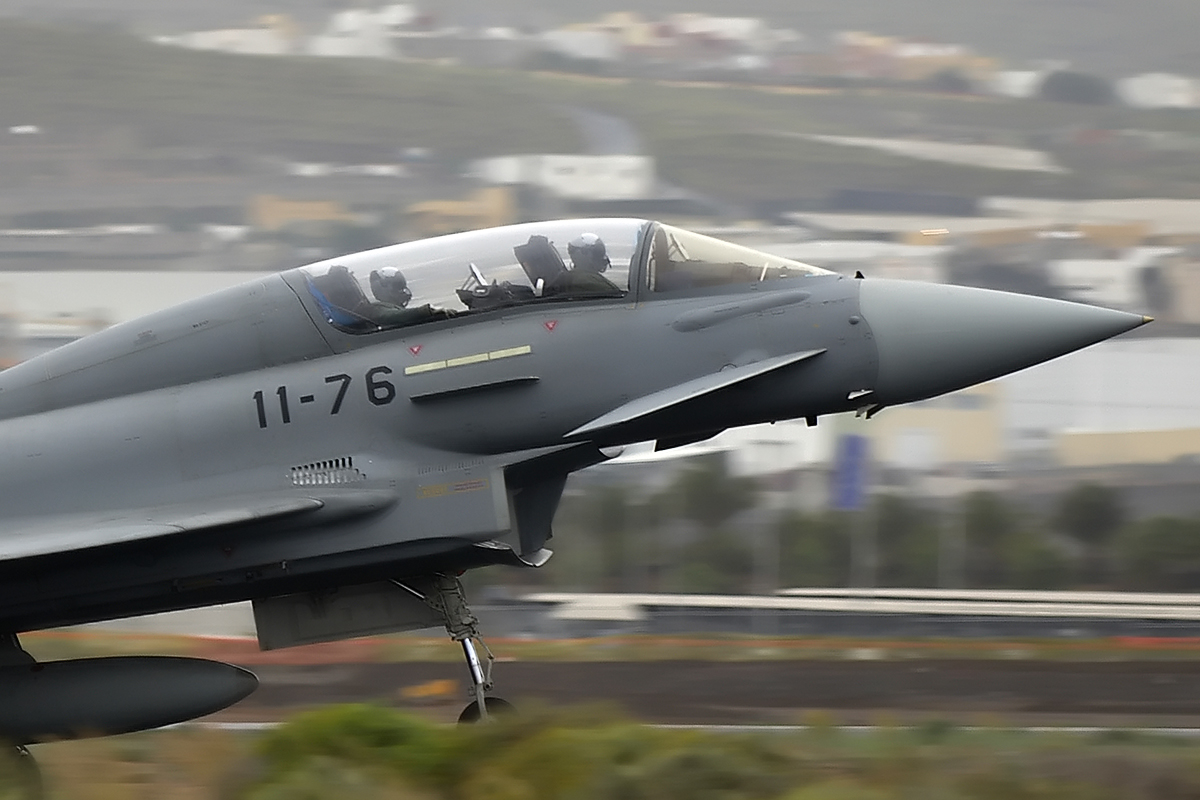 Despegue de un Eurofighter biplaza.